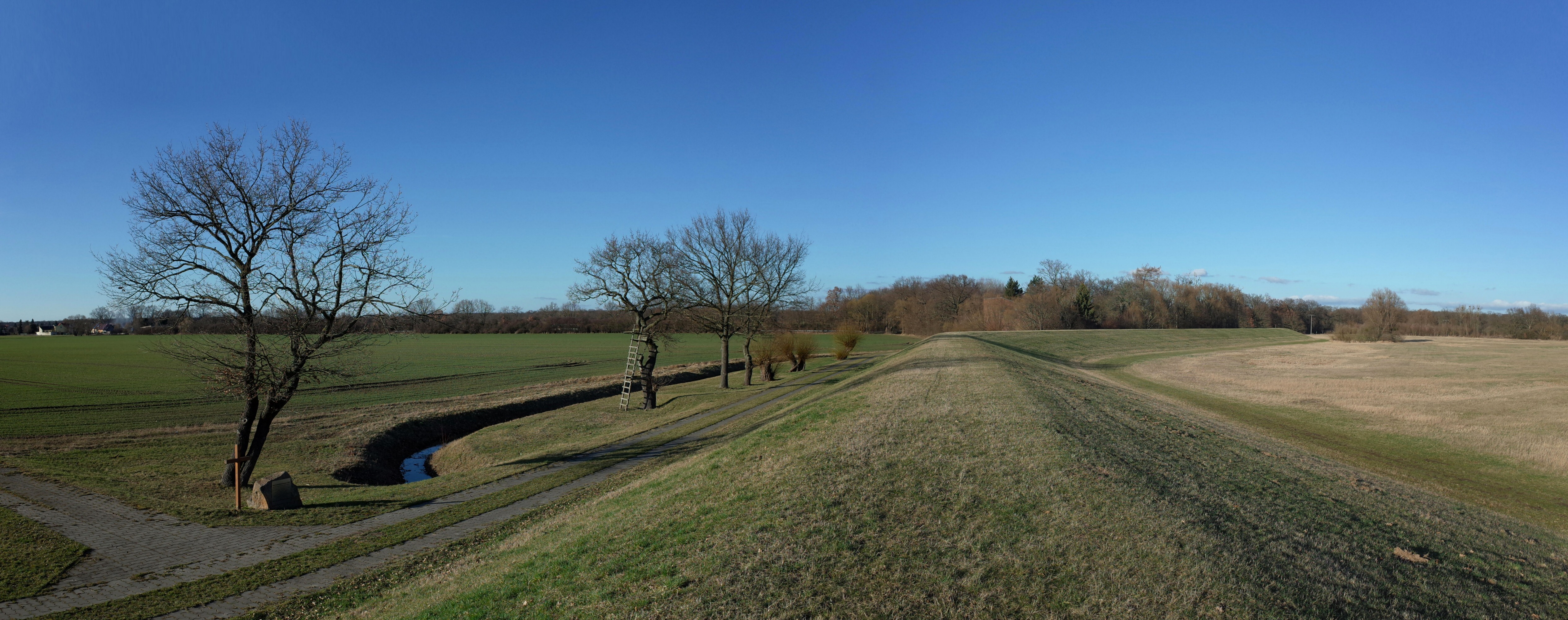 Dessau-Roßlau, Ortsteil Waldersee. Der Schwedenwall mit Gedenktafel und Kreuz. An dieser Stelle brach der Deich bei dem Jahrhunderthochwasser im August 2002 und führte zur Überflutung der Ortschaft Waldersee.